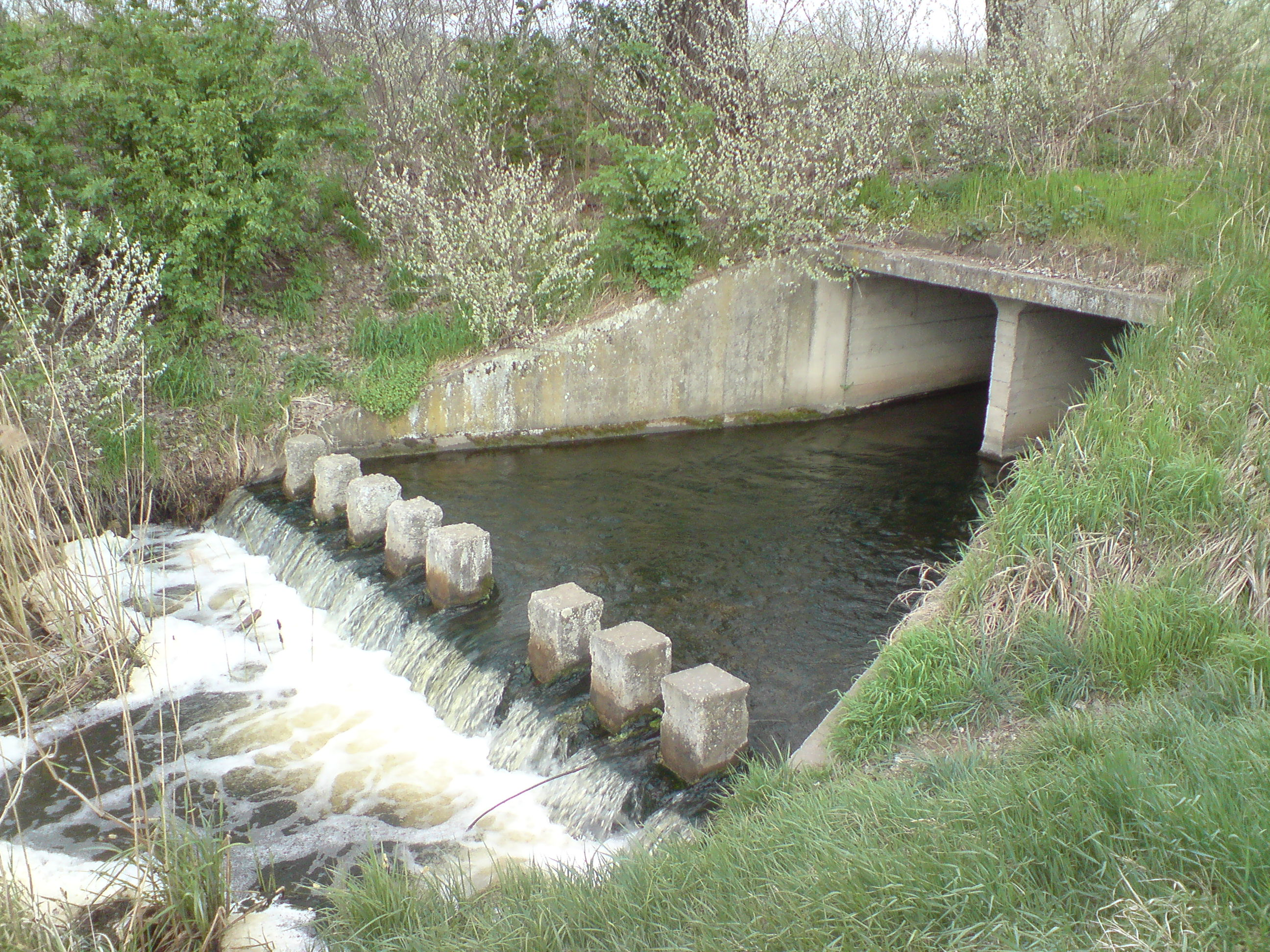 bukógát a körös patakon